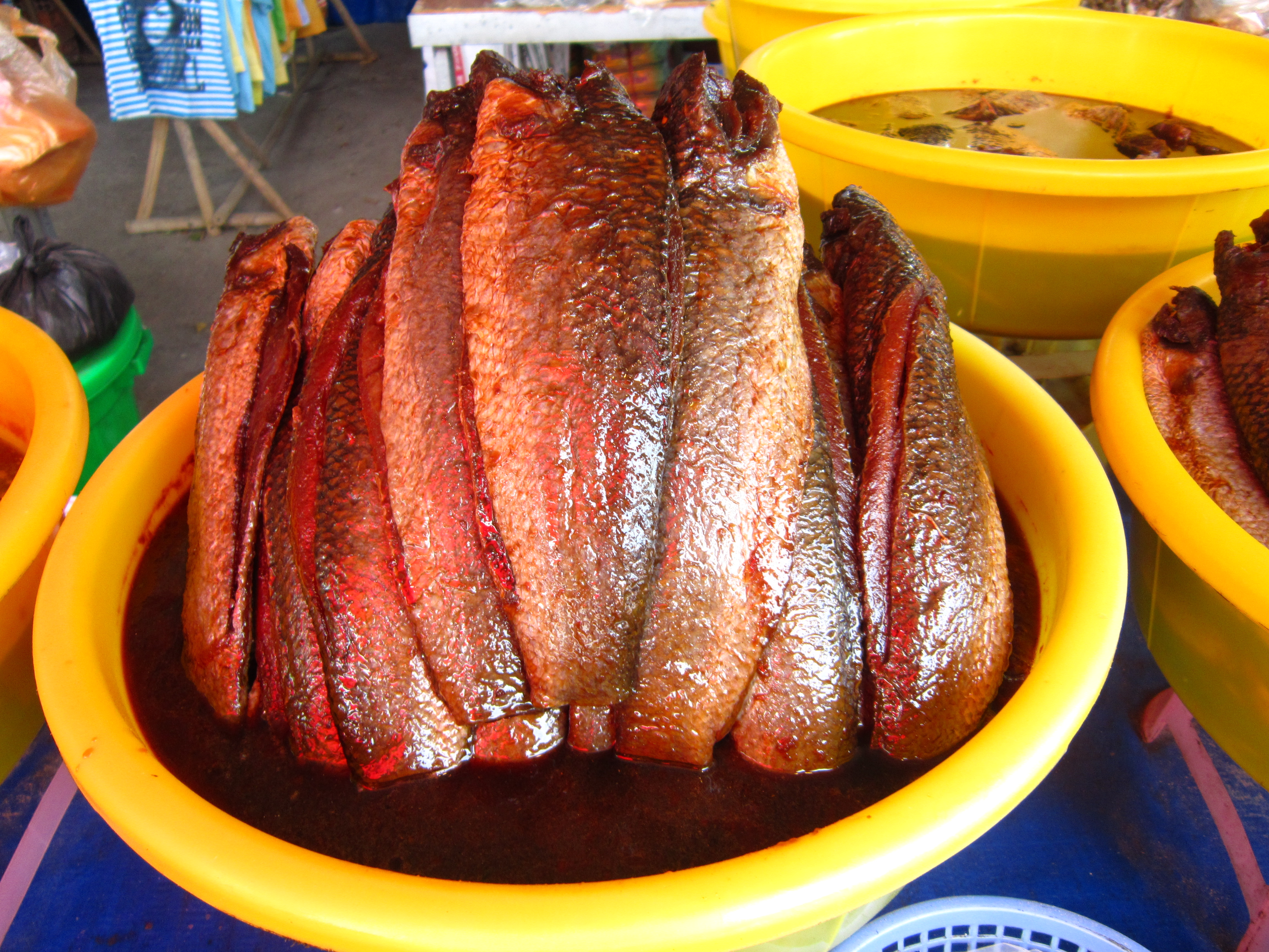 Mắm cá lóc ở Châu Đốc, An Giang, Việt Nam.